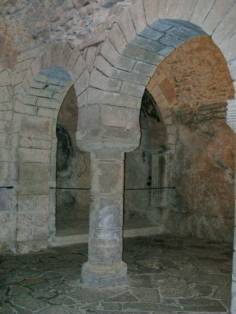 Monasterio de San Juan de la Peña en la provincia de Huesca (España)